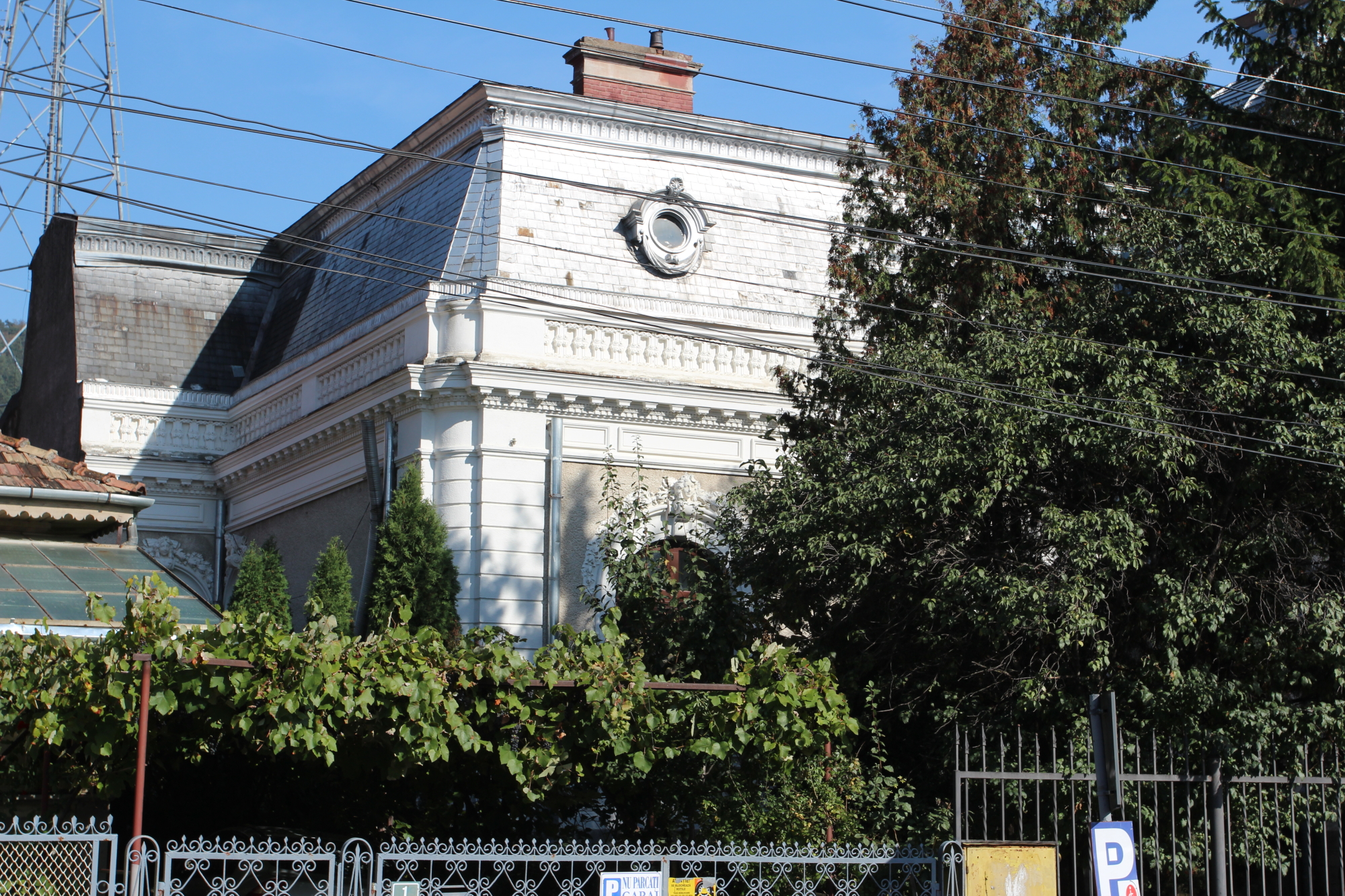 Casă Str.Alexandru cel Bun